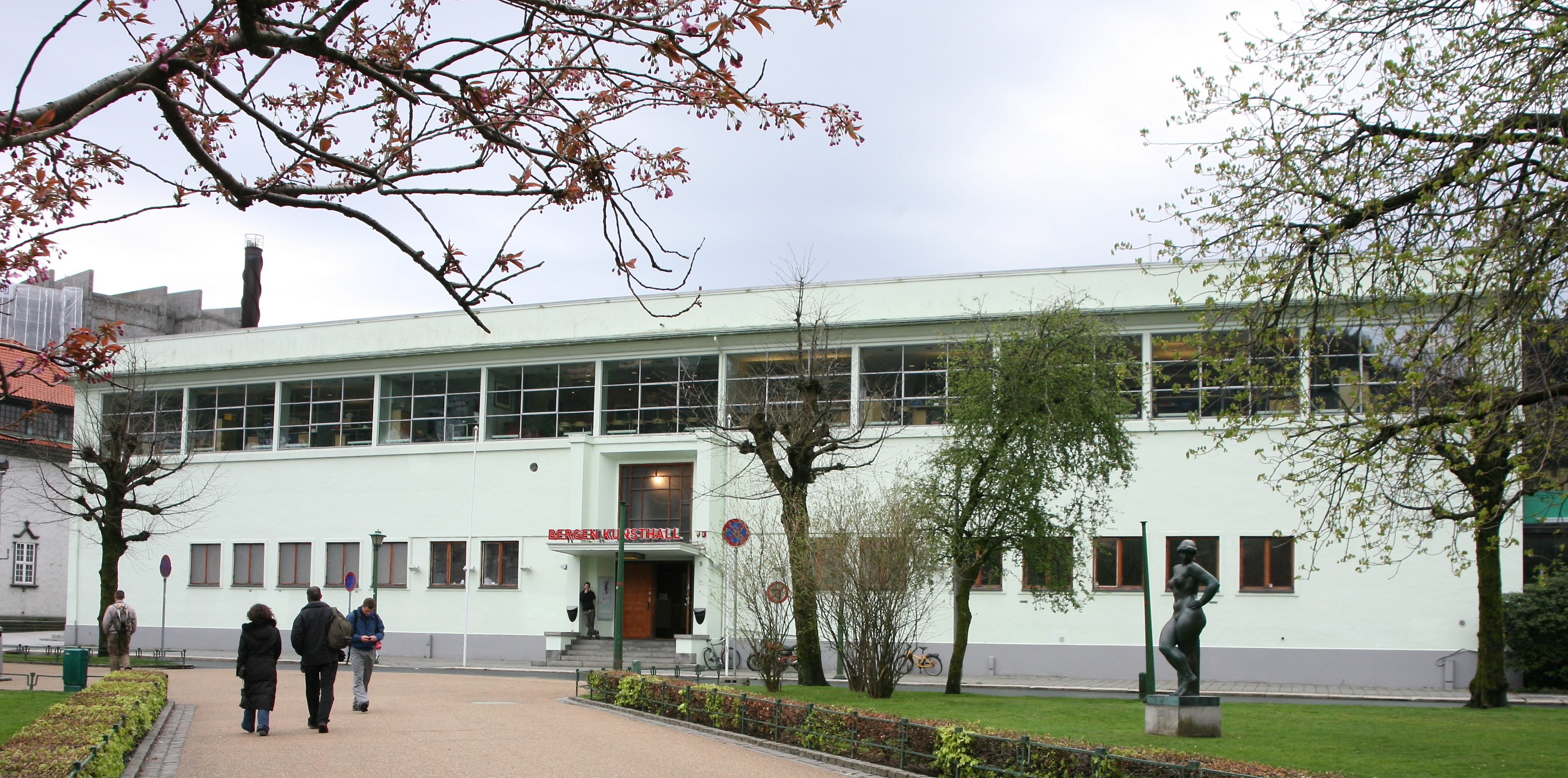 Bergen kunsthall